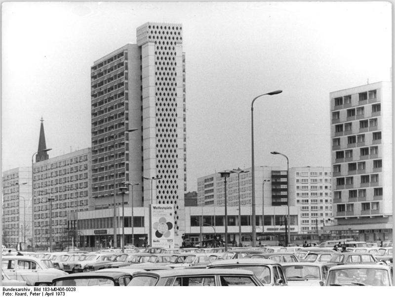 ADN-ZB Koard 6.4.1973 Berlin: Wer einen Einkaufsbummel im Zentrum Berlins machen will, kann seinen Wagen auf einem der nahen Parkplätze abstellen (unser Foto zeigt einen Blick auf die Hans-Beimler-Straße mit ihren attraktiven Neubauten).